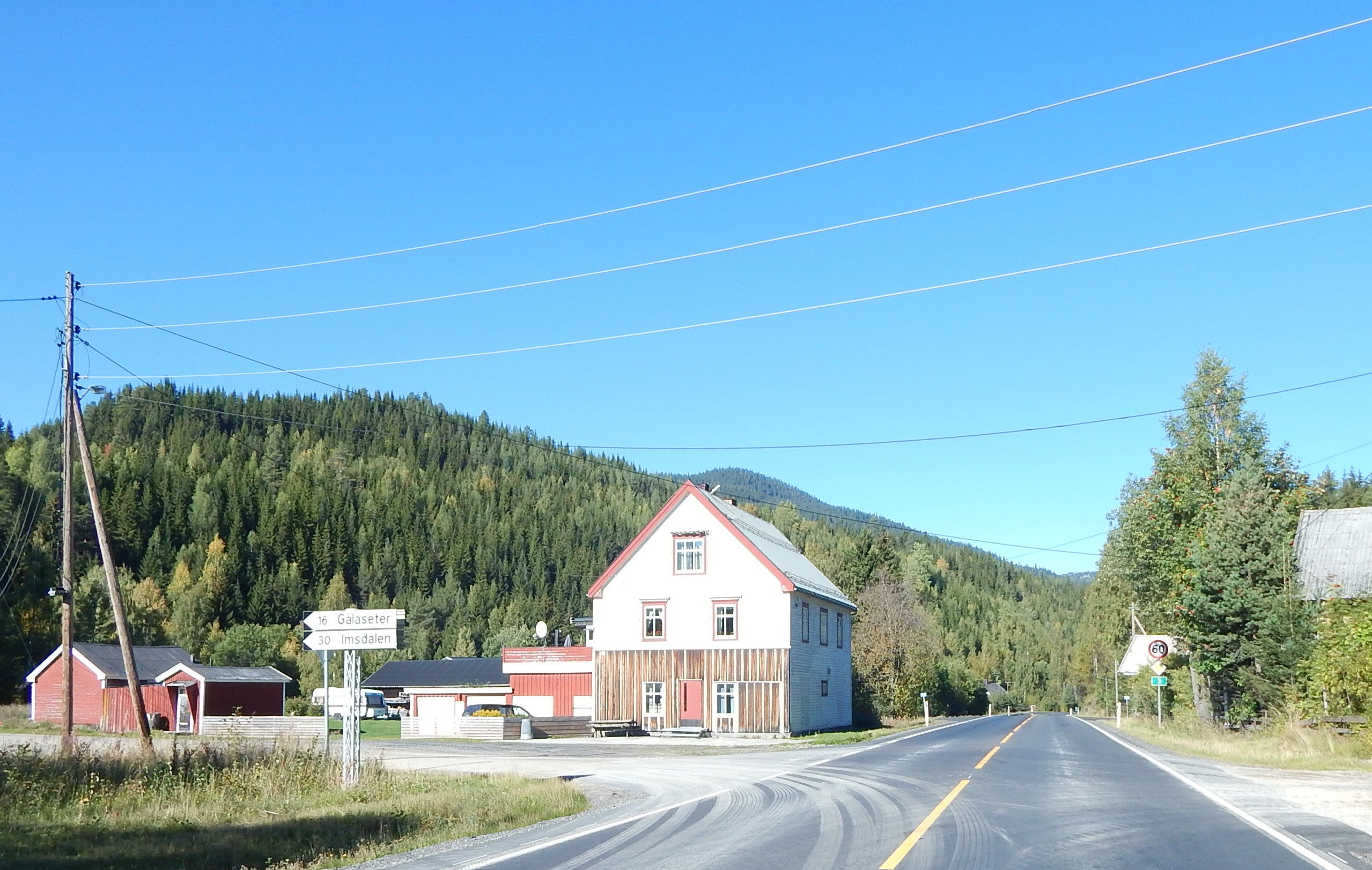 Riksvei 3 gjennom Imsroa